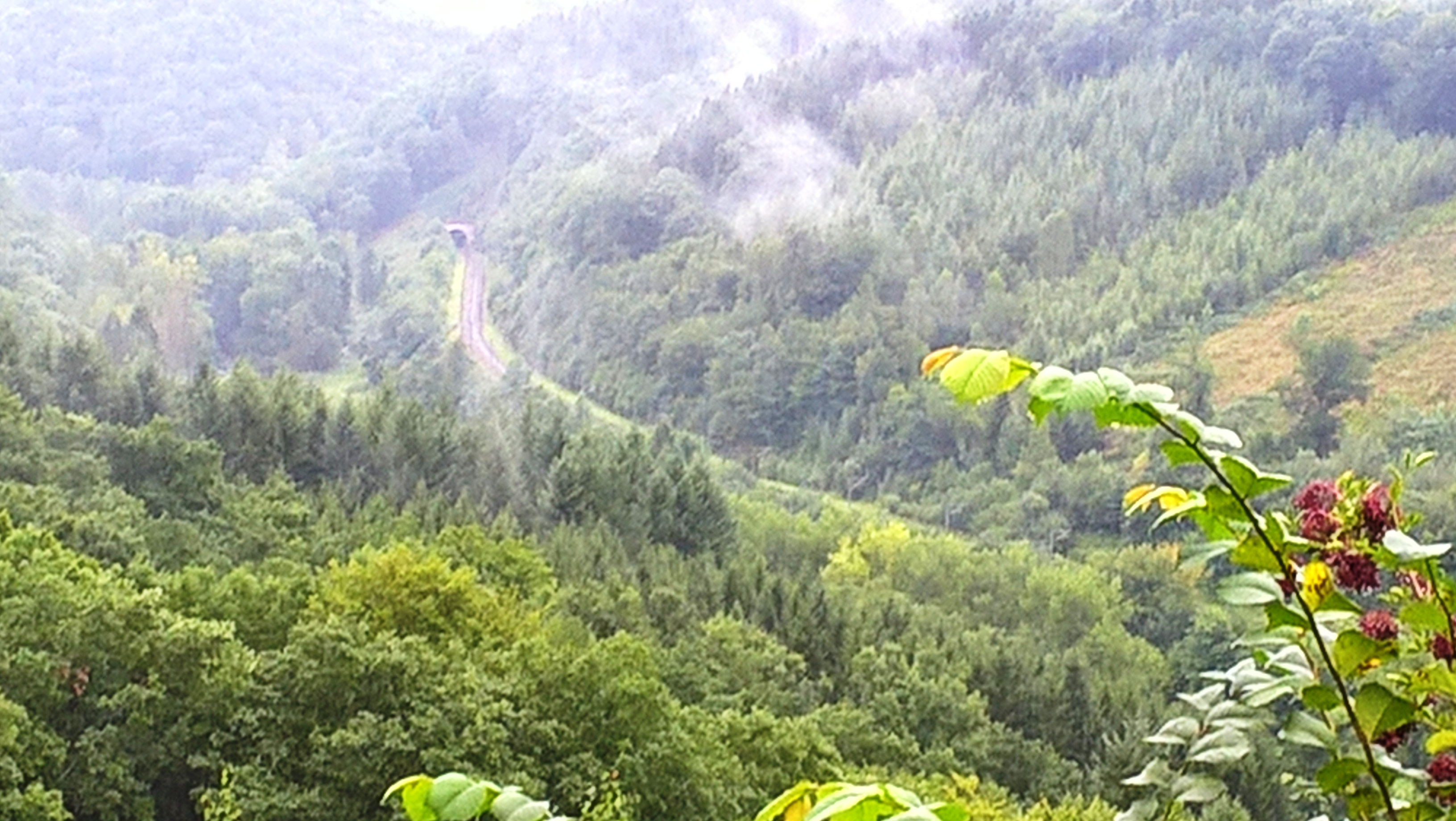 Ainsi appelé parce qu'il rappelait les récits d'exploration du Congo lors de la construction de la voie ferrée fin XIXème.